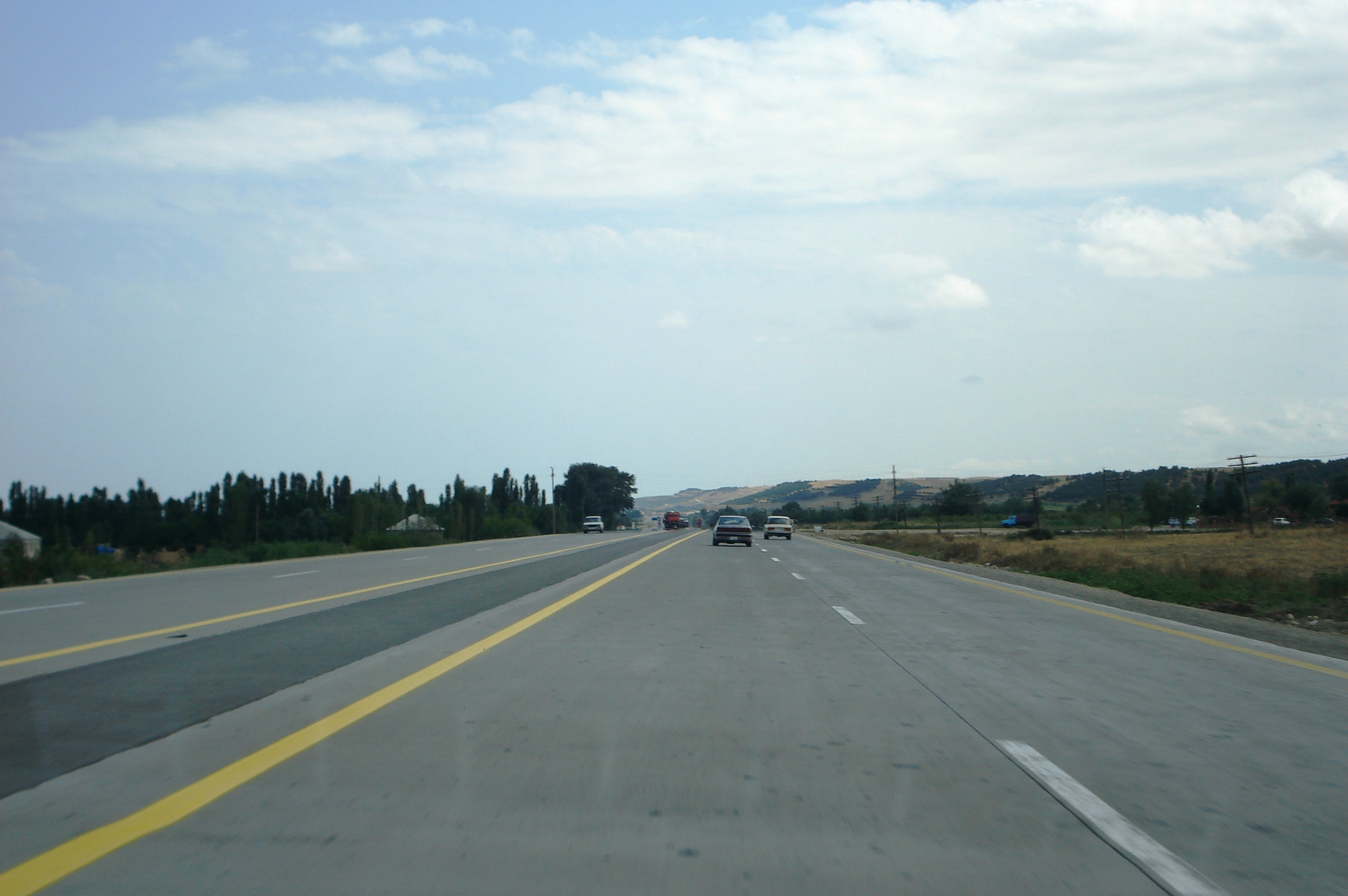 Трасса М2 в Азербайджане